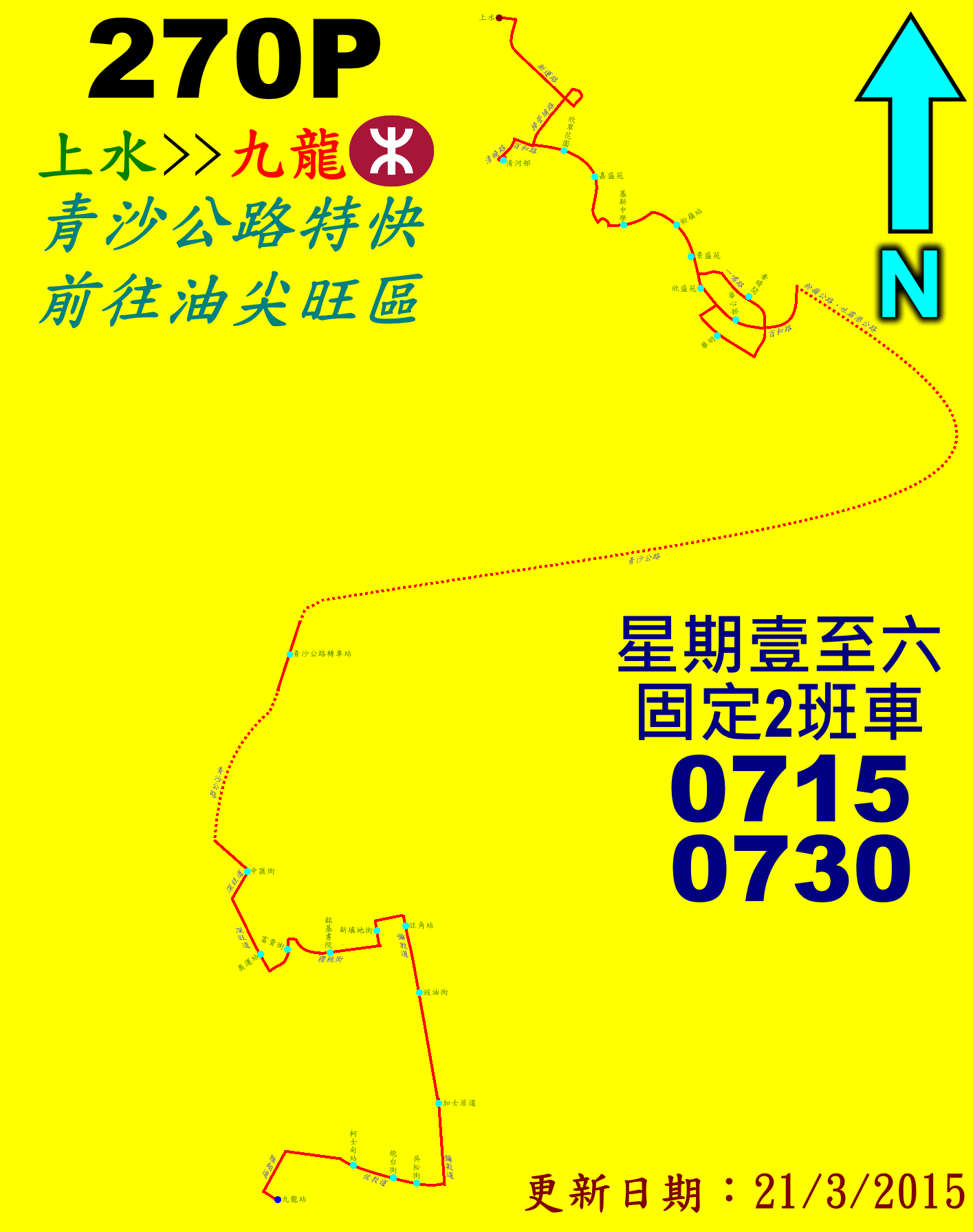 中文（香港）: 九巴270P線的走線圖